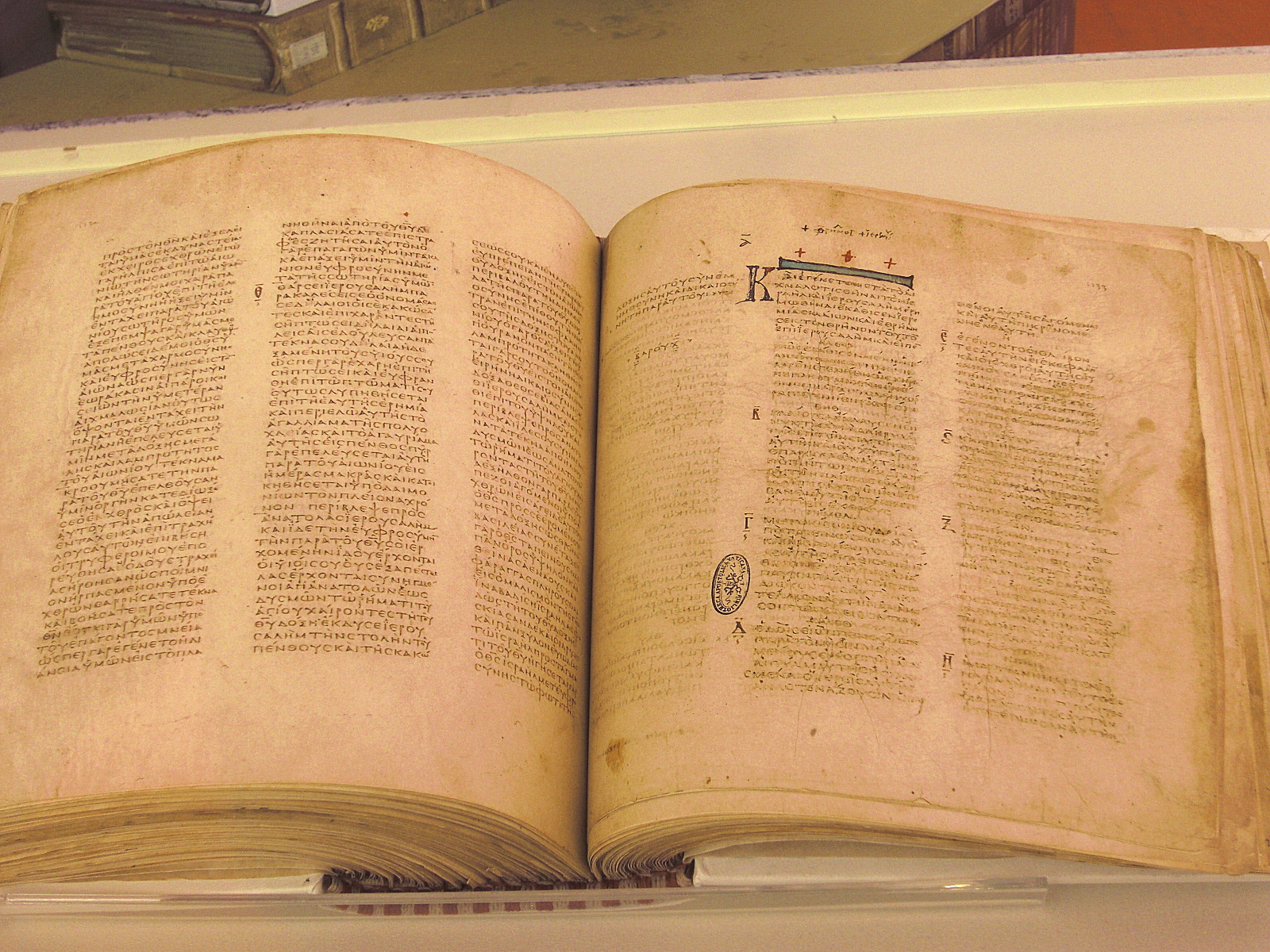 Codex Vaticanus, XXI Targi Wydawców Katolickich 2015-05-03